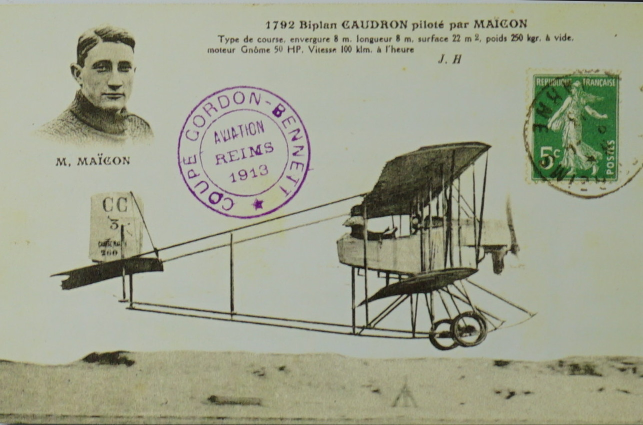 en 1913 lors d ela Grande Semaine d'Aviation de la Champagne.